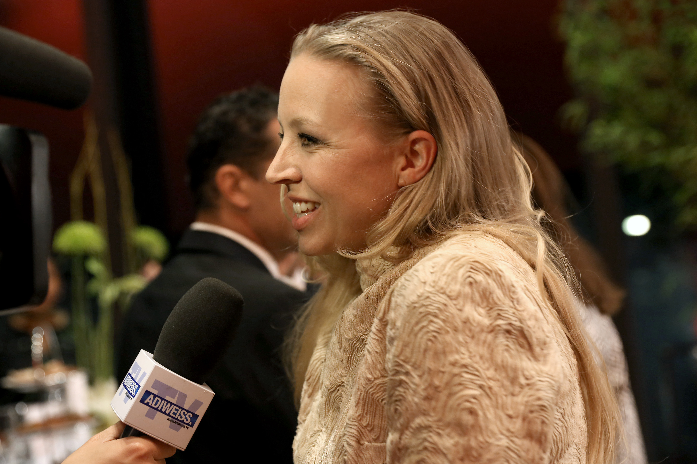 Nina Proll - Nestroy-Theaterpreis 2013 in der Halle F der Wiener Stadthalle (Wien, Österreich).